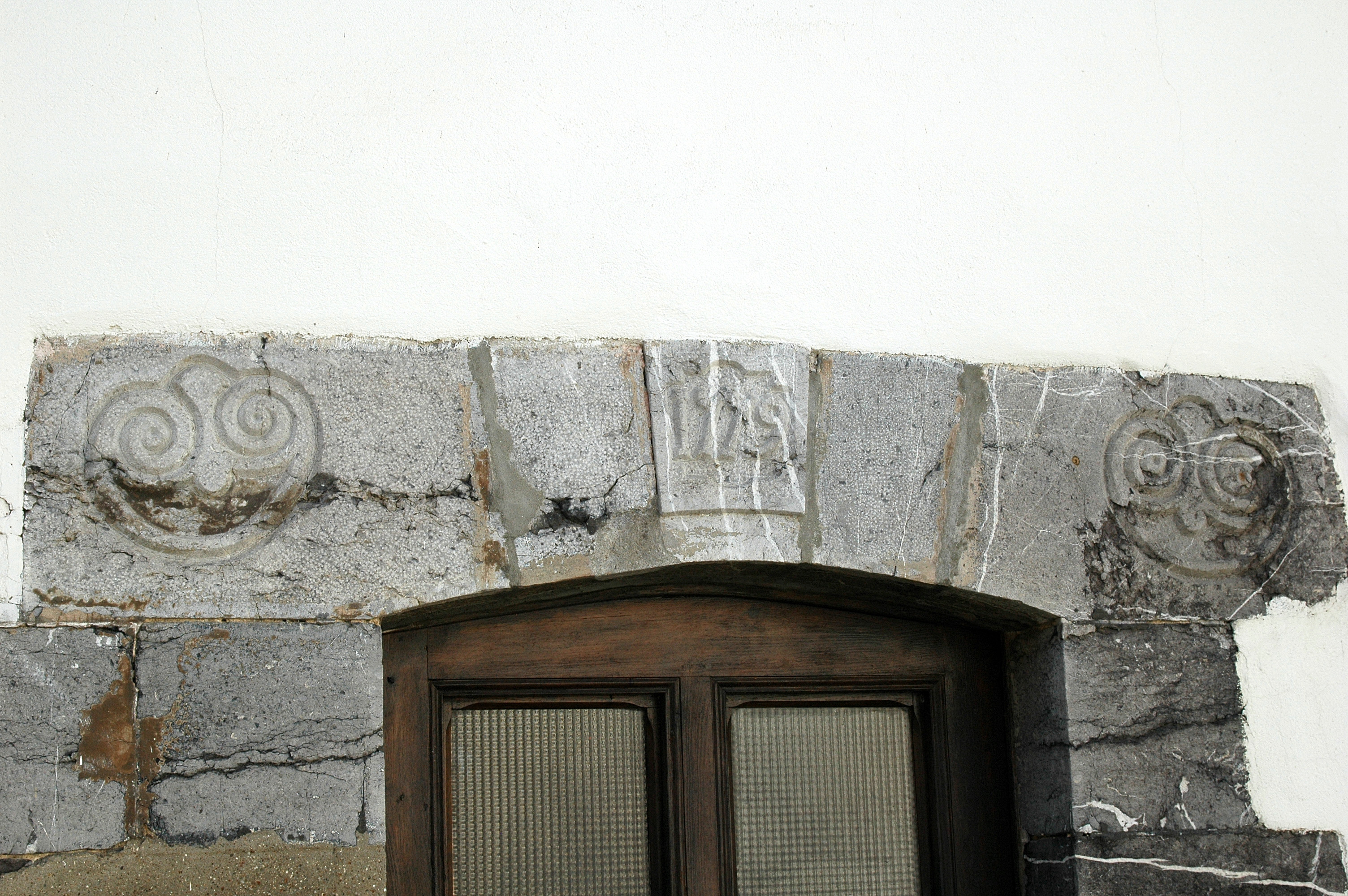 Hasparren, dans le quartier d'Urcuray, détail d'un linteau. Photo prise le 31/12/06 par Harrieta171